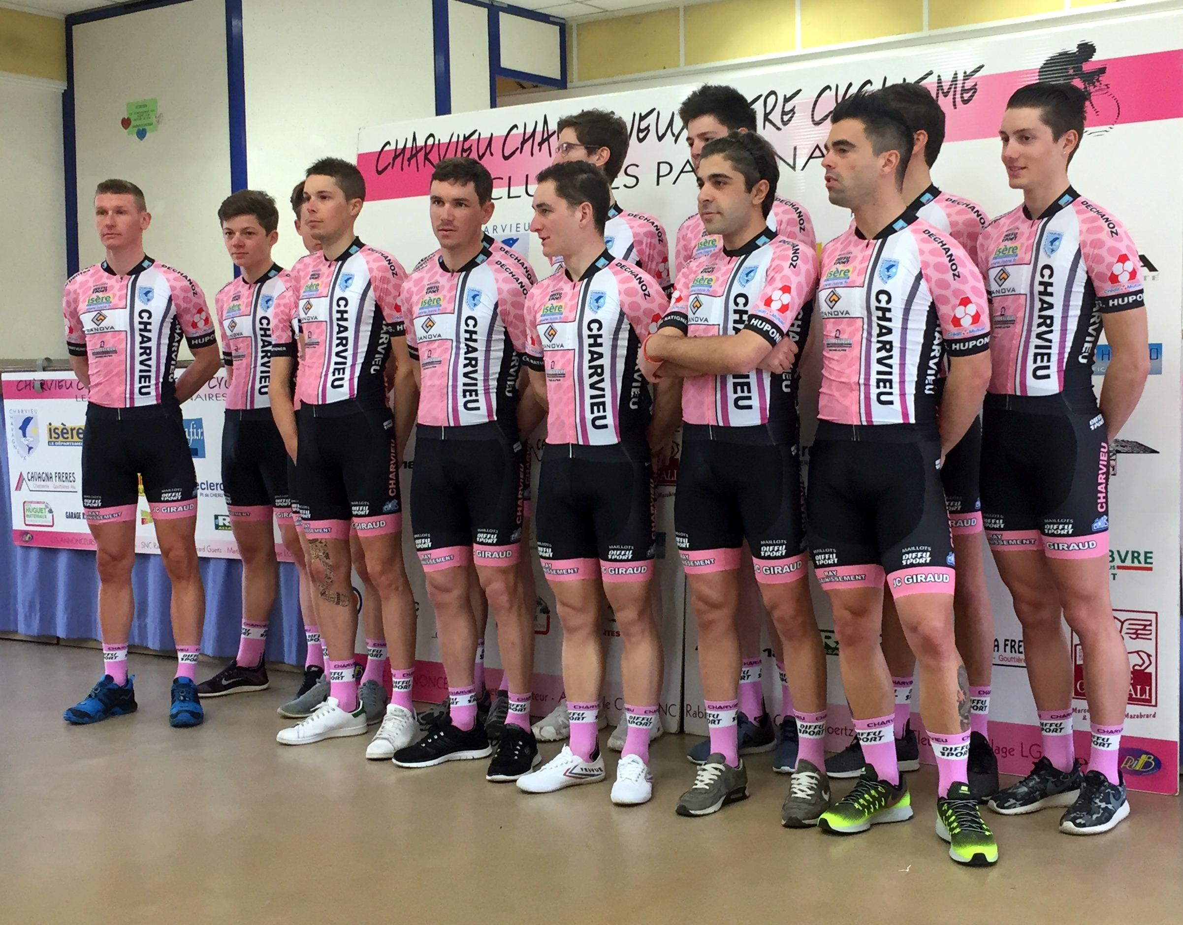 Présentation de l'équipe cycliste de DN2 Charvieu-Chavagneux Isère Cyclisme à la salle Roger-Gauthier à Charvieu-Chavagneux en février 2017.